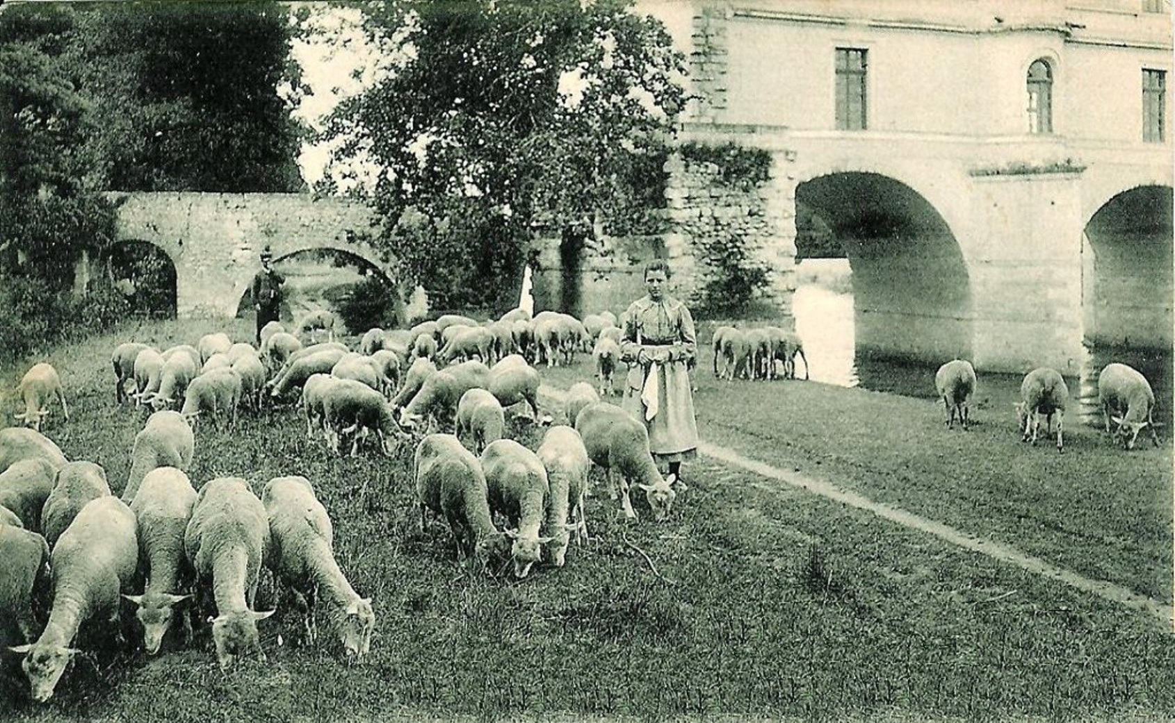 Le château de Chenonceau et les bords du Cher en 1900, dans le département de l'Indre-et-Loire.